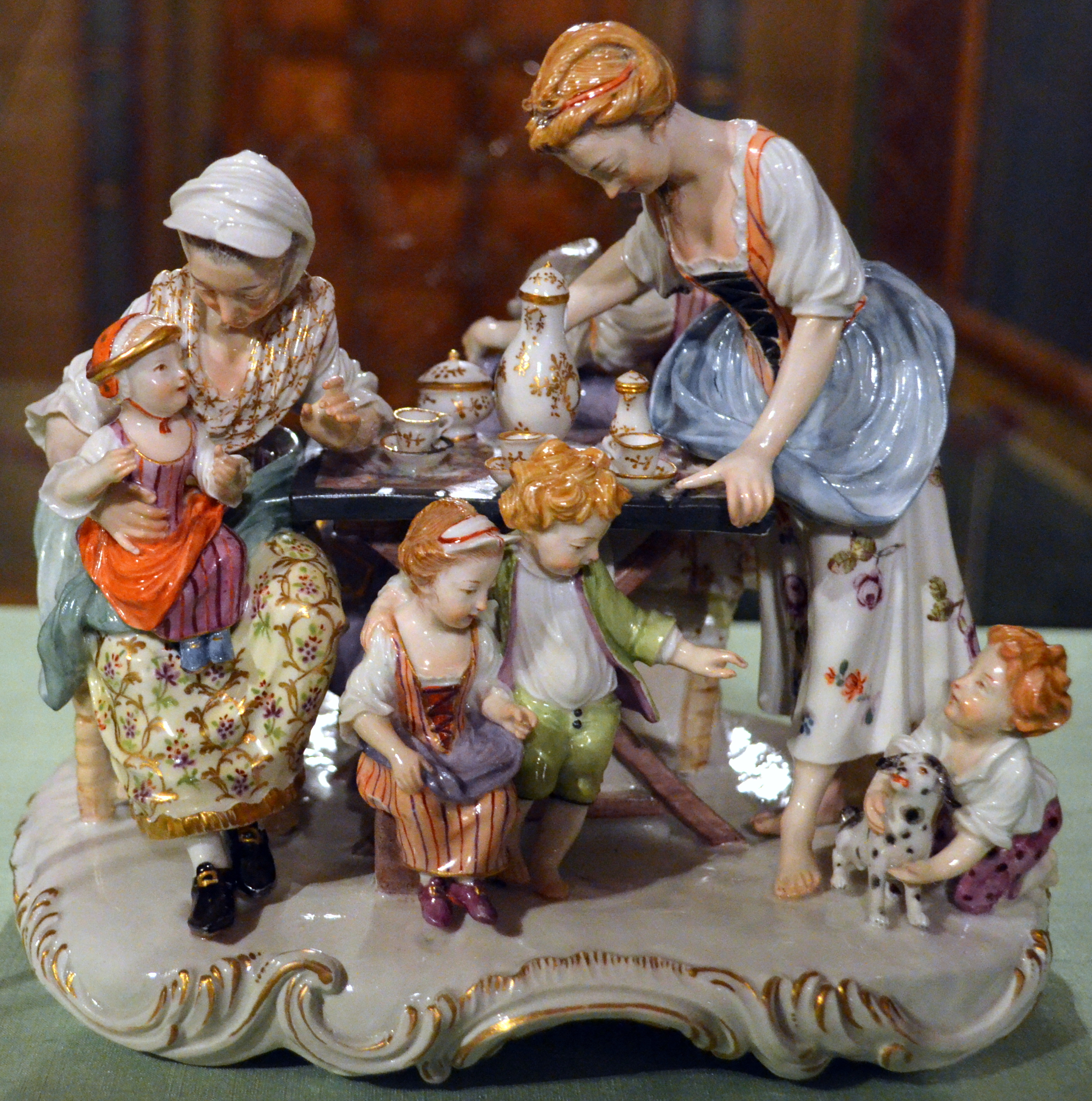 Die Kaffeegesellschaft von Jean Jacques Desoches im Herzog Anton Ulrich-Museum in Braunschweig.